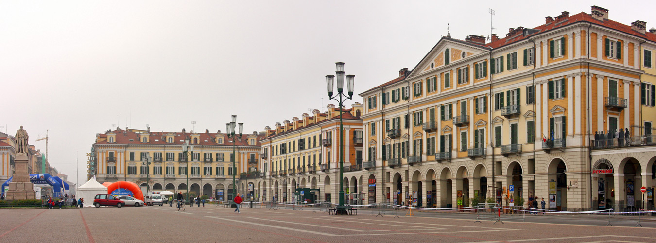 Panorama di piazza Galimberti (lato nord-ovest, sud-ovest e monumento) a Cuneo